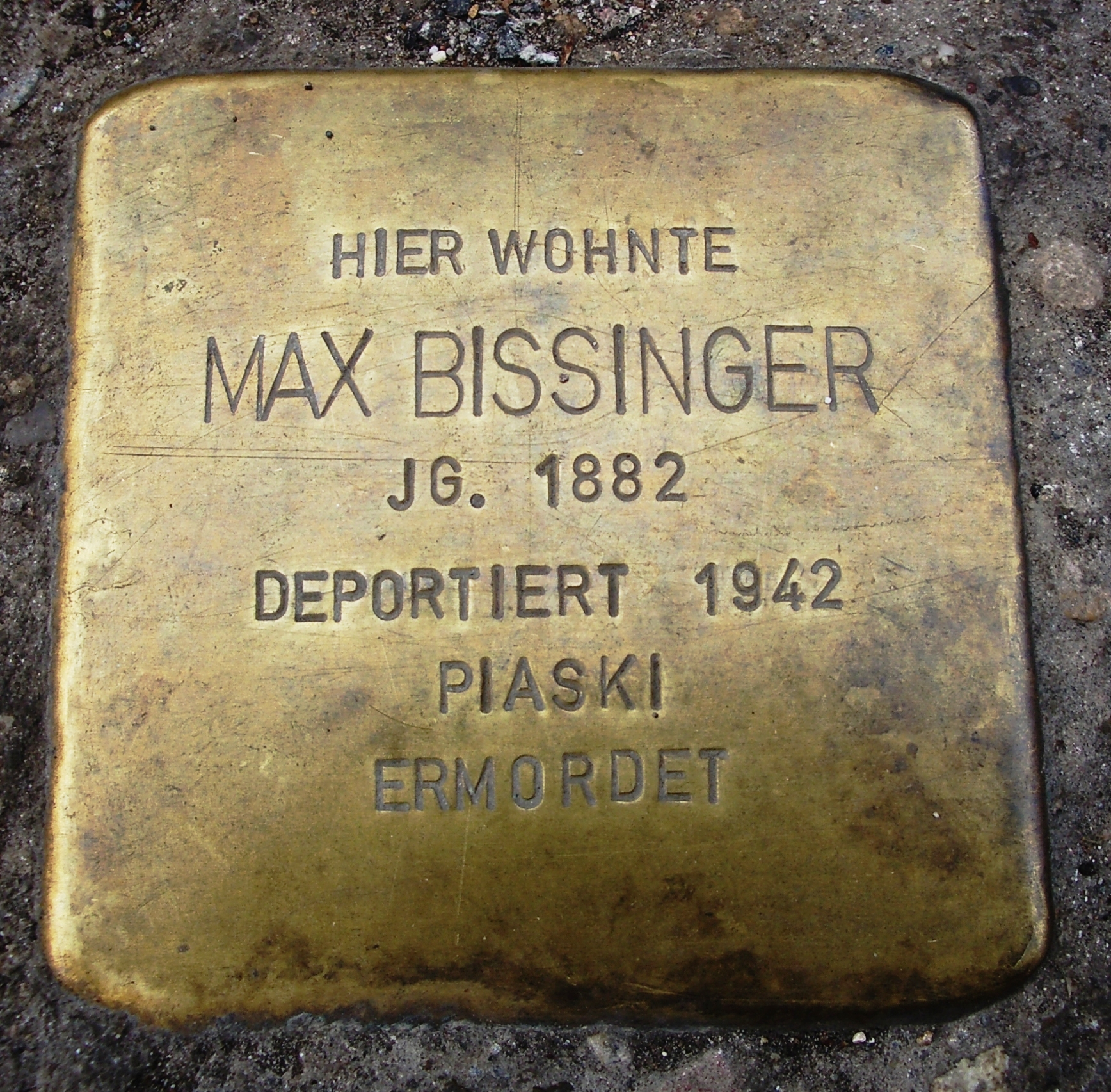 Der Stolperstein für Max Bissinger befindet sich in der Augsburger Straße 34 in Neu-Ulm, Bayern.